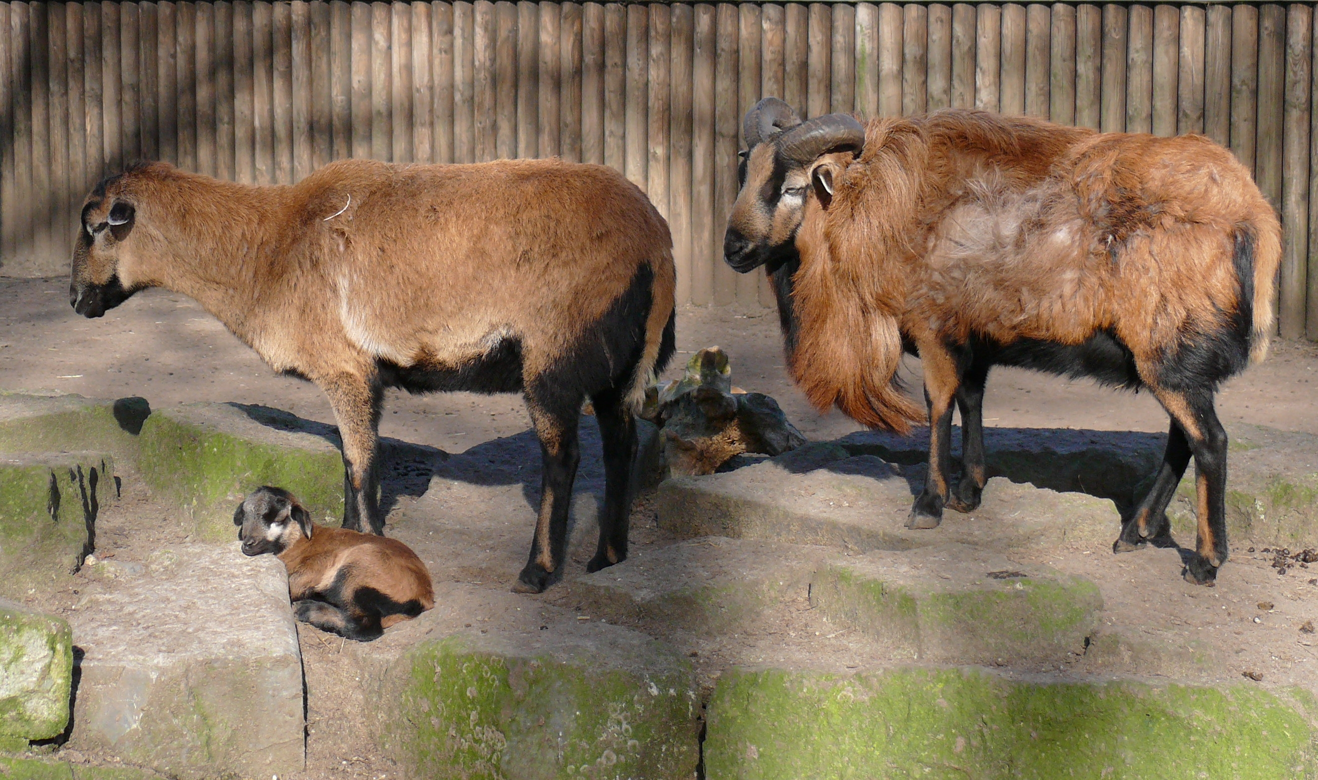 Kamerun Schafe, Cameroon sheep